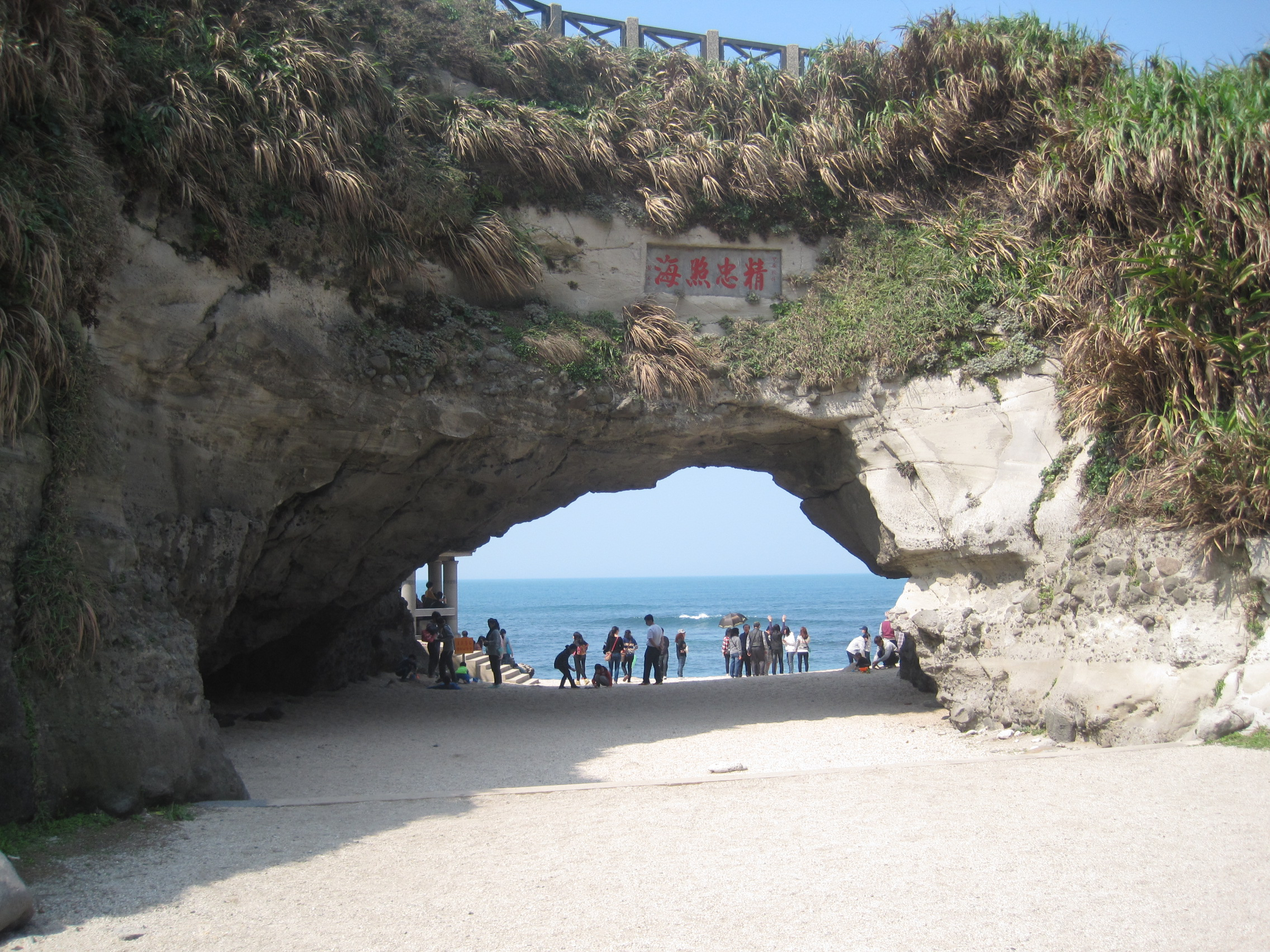 石門洞，位於新北市石門區，也是石門地名的由來。